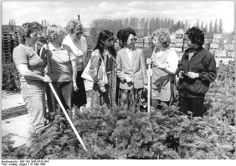 LPG Mühlhausen, Besuch einer chinesischen Delegation ADN-ZB Ludwig-pr-18.5.88-Erfurt: Eine Frauendelegation des Allchinesischen Frauenbundes unter Leitung des Mitglieds des Exekutivkomitees Zhang Xiaolan (3.v.r.) besuchte im Mai d.J. Einrichtungen der LPG (P) "Thomas Müntzer" Mühlhausen. Mitglieder der Brigade informierten die Gäste überVermehrung von Pflanzen. Aufmerksame Zuhörer waren auch Zhang uingfang (r.), Yu Xiaoxuan (4.v.r.) und Eva Rohmann (3.v.l.), Sekretär des Bundesvorstandes des DFD.